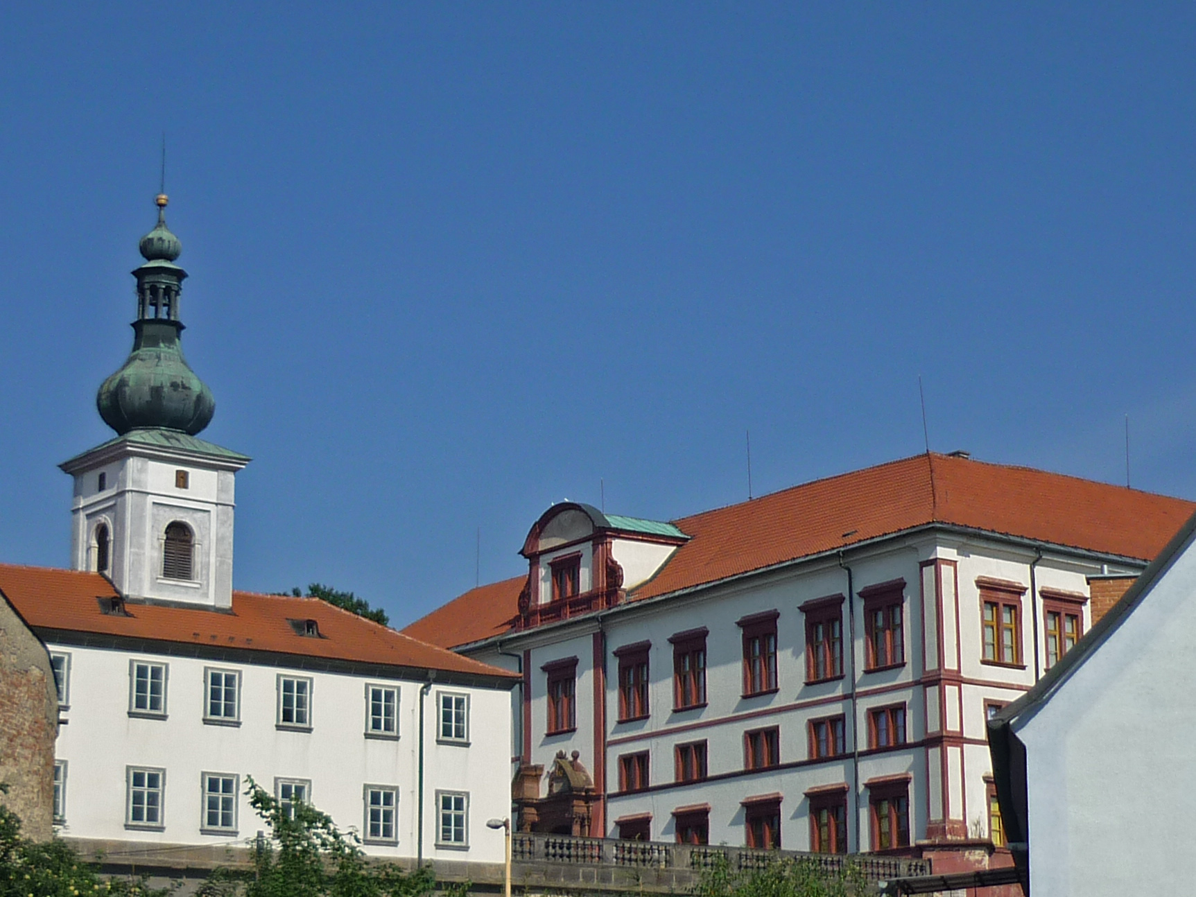 Schloss Reichstadt in Zákupy